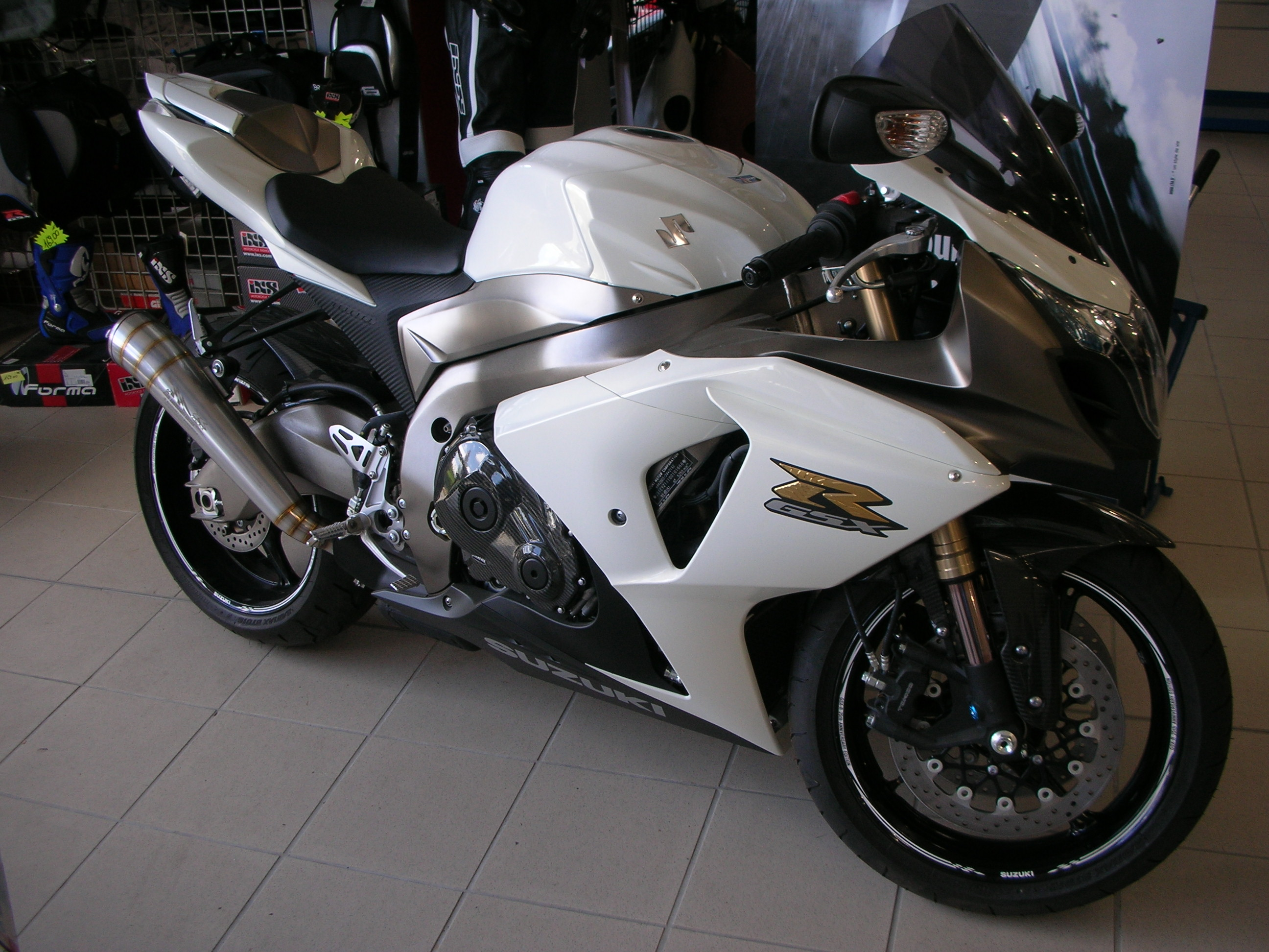 GSX-R 1000 2010 25th Anniversary Edition, modèle France (100ch)